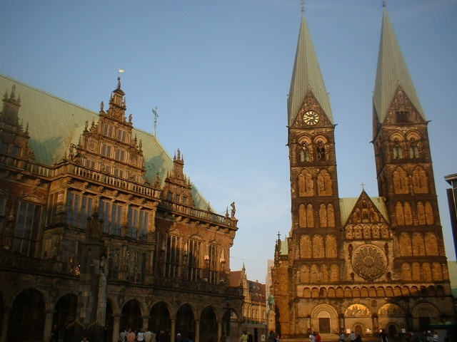 Dolnoserbski: stary dom w Bremje.